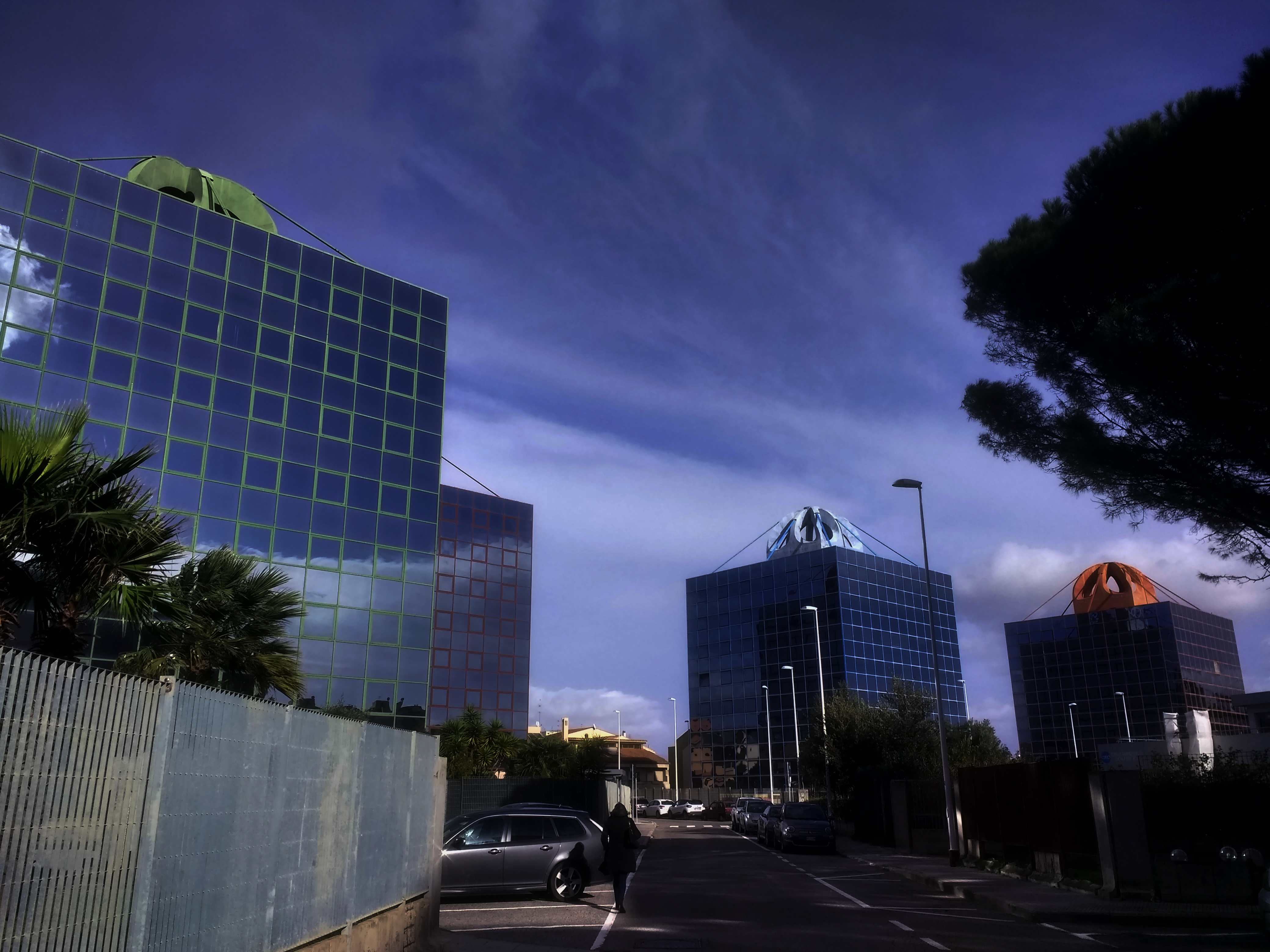 Foto scattata a Pirri nel dicembre 2019